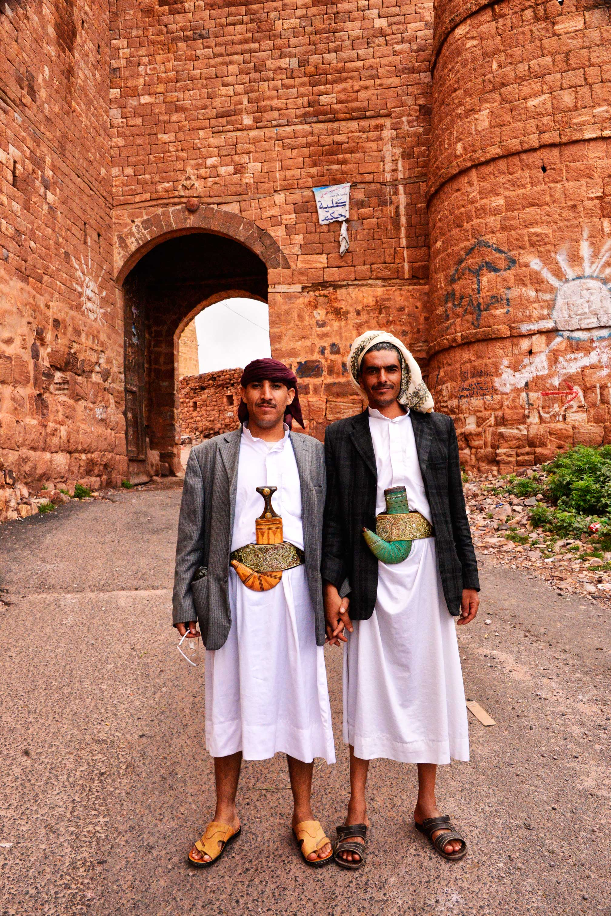 Haraz Mtns